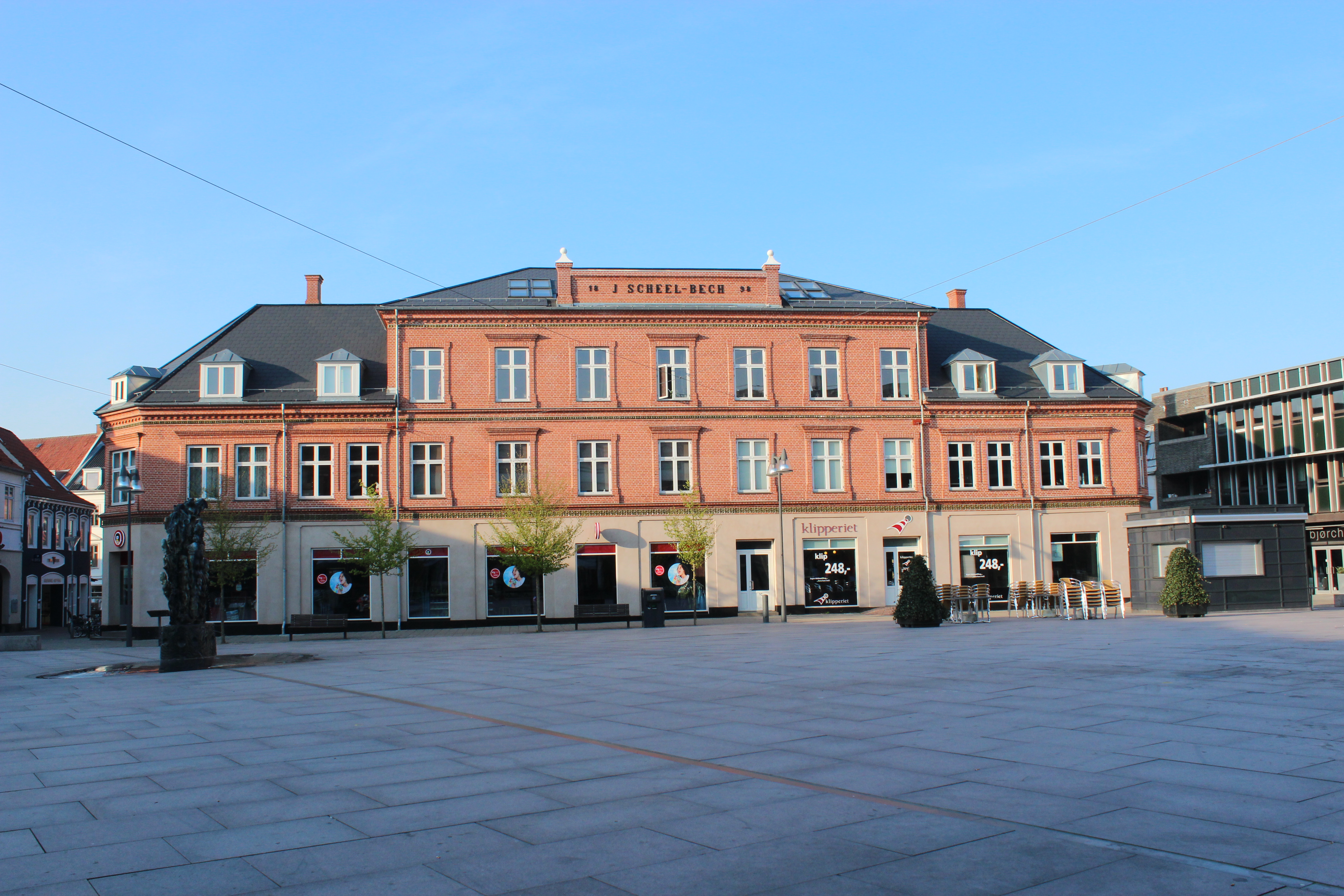 Axeltorv i Næstved.